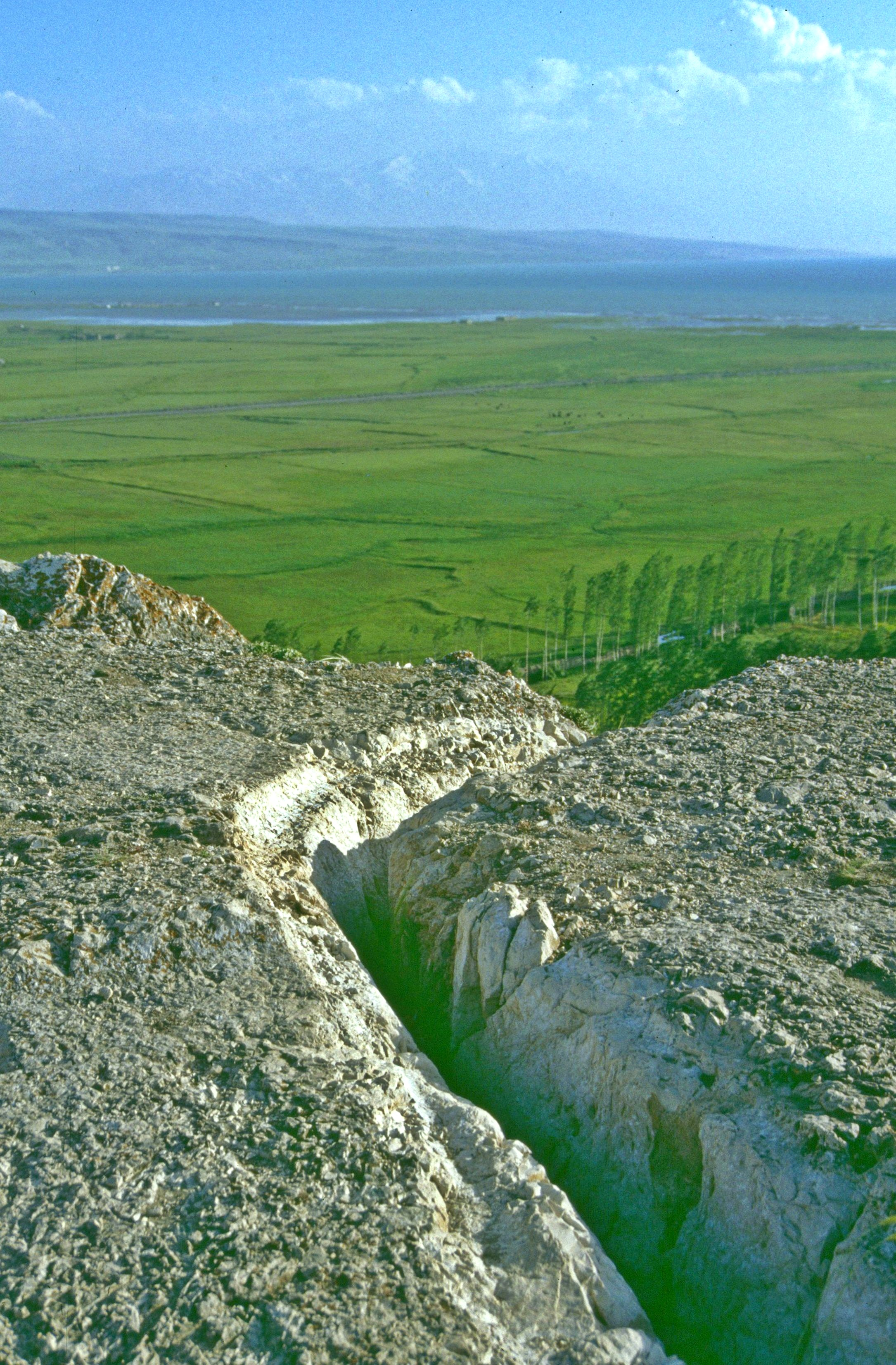 Tušpa, Wasserleitung